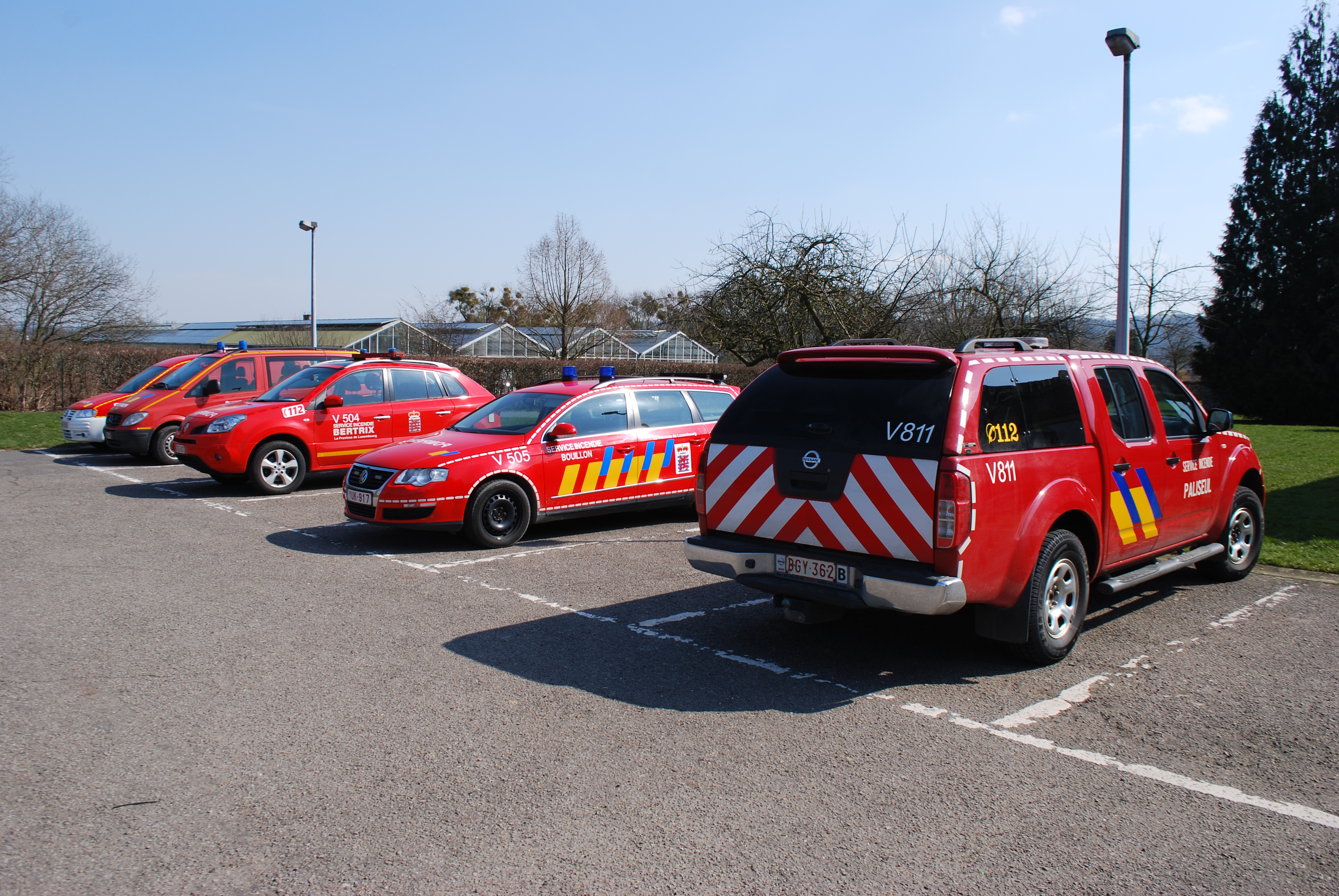 Voitures de pompiers sur le parking de la Ferme expérimentale de l'Université de Liège au Sart Tilman.